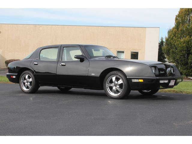 Front 3/4 view of a 1991 Avanti II 4-door sedan.